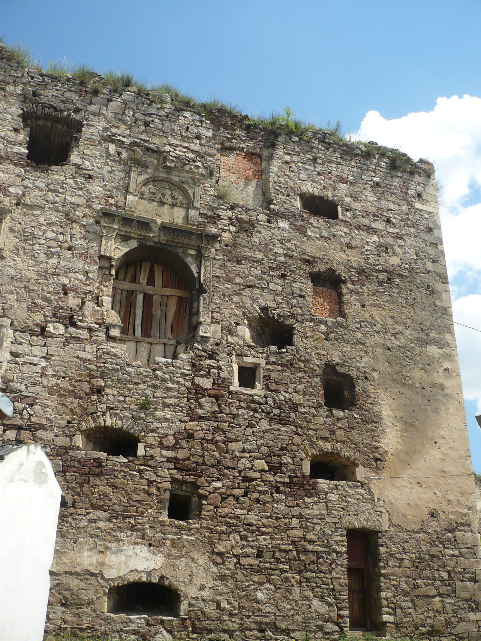 Jazłowiec. Zamek